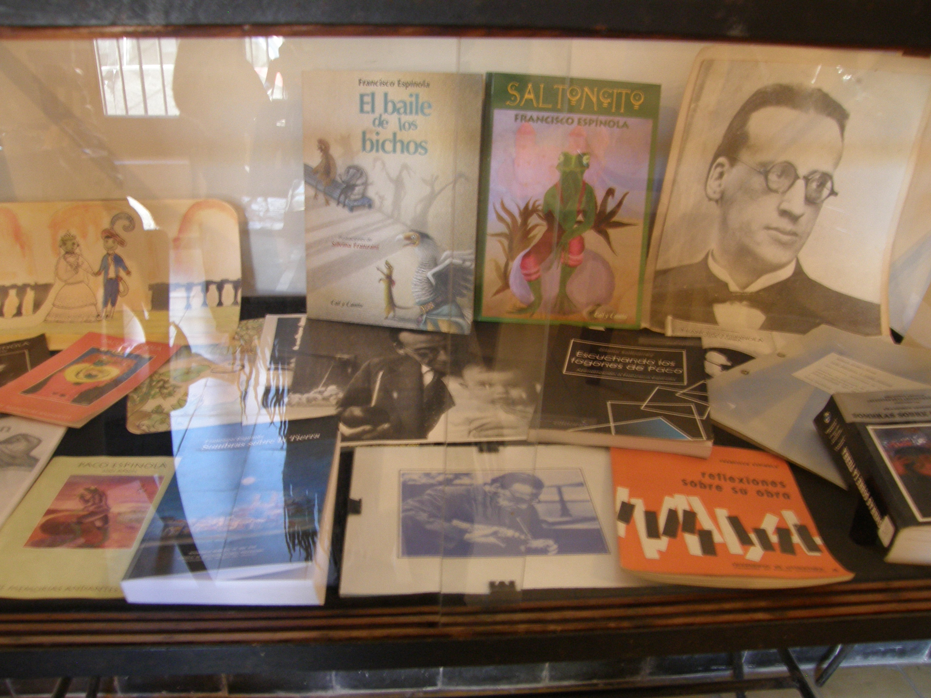 Vitrina con fotos y obras de Francisco Espínola